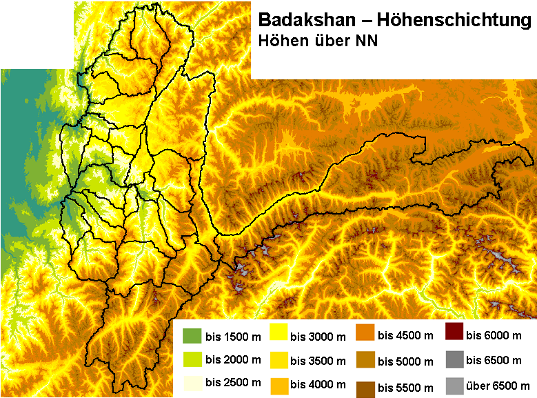 Topographische Karte von Badakshan